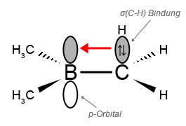 Hyperkonjugation im BMe3-Molekül